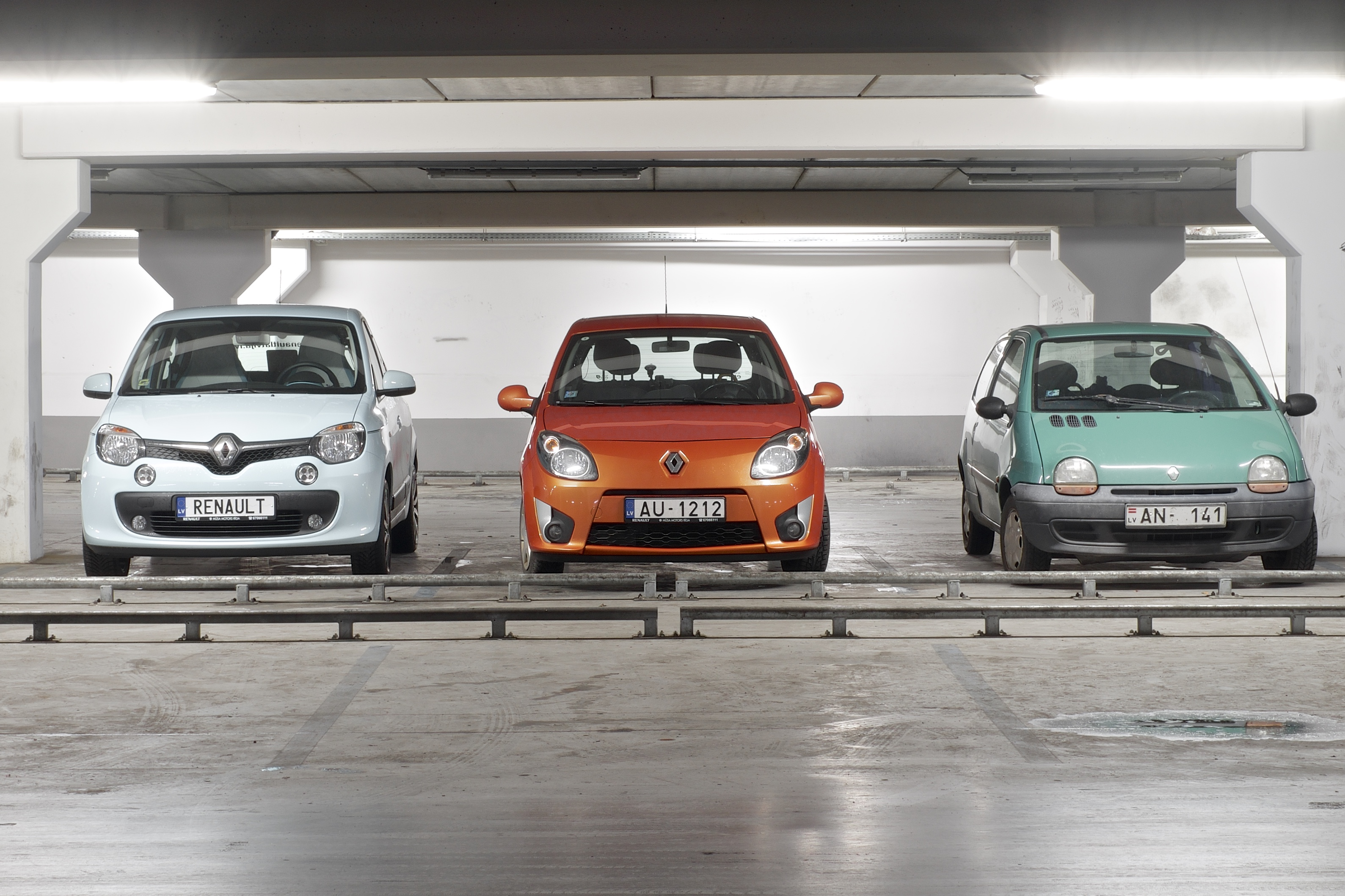 Renault Twingo 2014 v 2008 v 1993